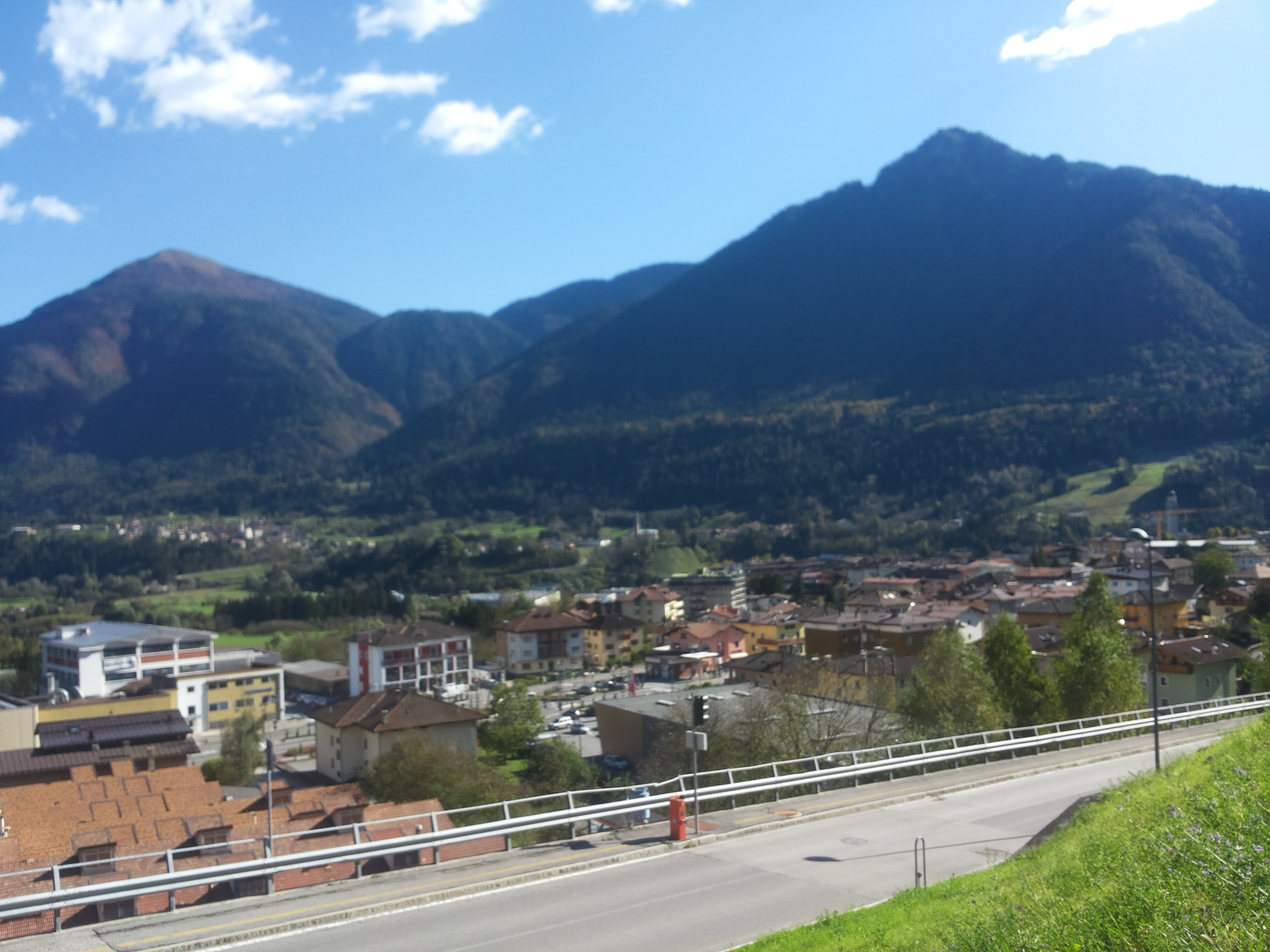 Tione (provincia di Trento)